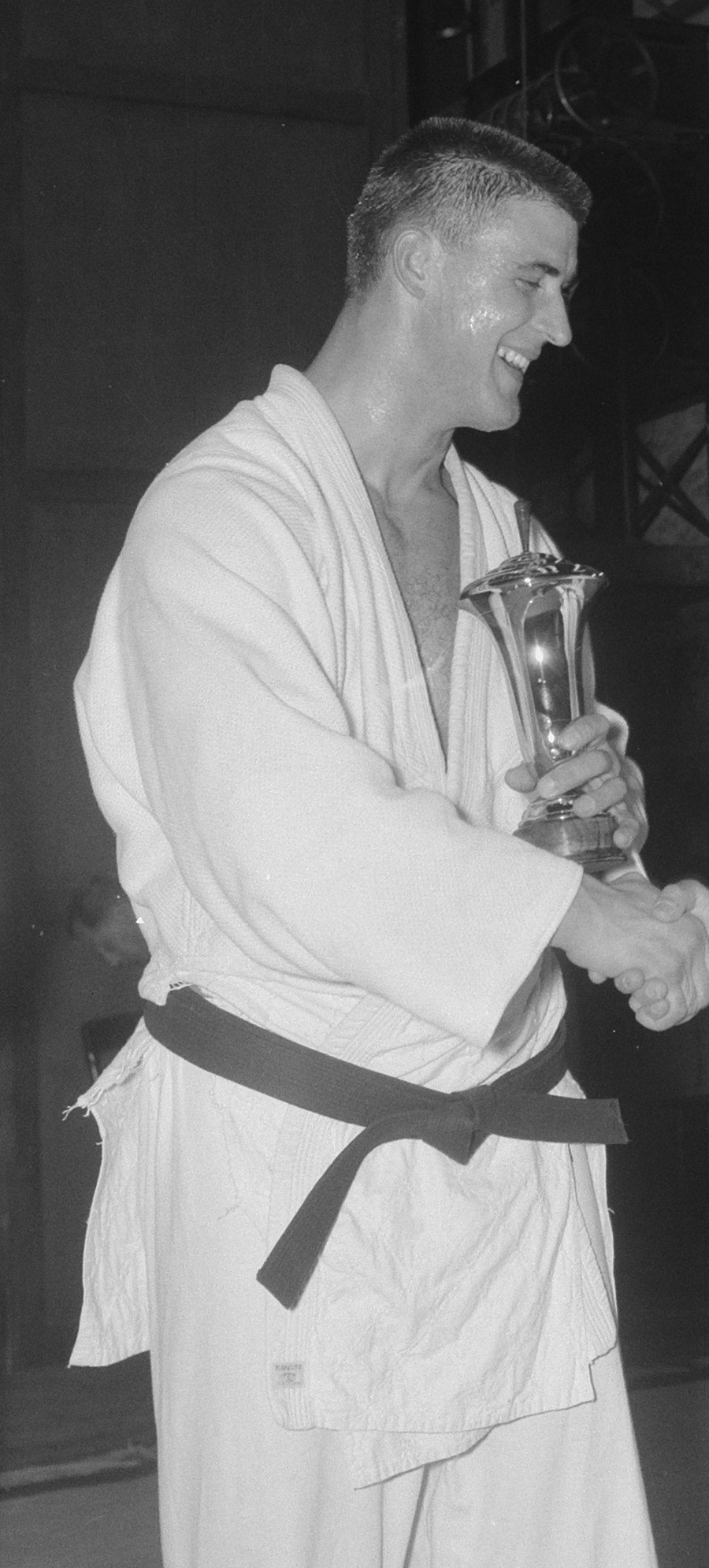 Nationaal Archief Beschrijving: Kampioenschappen Judo in Utrecht. Anton Geesink en Japanse judoka Datum: 22 oktober 1961 Vervaardiger: Anefo / Nijs, Jac. de Bestanddeelnummer: 913-0828 URL: [1] Voor meer informatie over het Nationaal Archief: Voor meer foto's uit deze en andere collecties, bezoek onze Beeldbank:, U kunt ons helpen onze kennis van de fotocollecties te verrijken door tags en commentaren toe te voegen. Herkent u mensen of locaties of heeft u een bijzonder verhaal te vertellen bij één van de foto's, laat dan een reactie achter (als u ingelogd bent bij Flickr) of stuur een mailtje naar